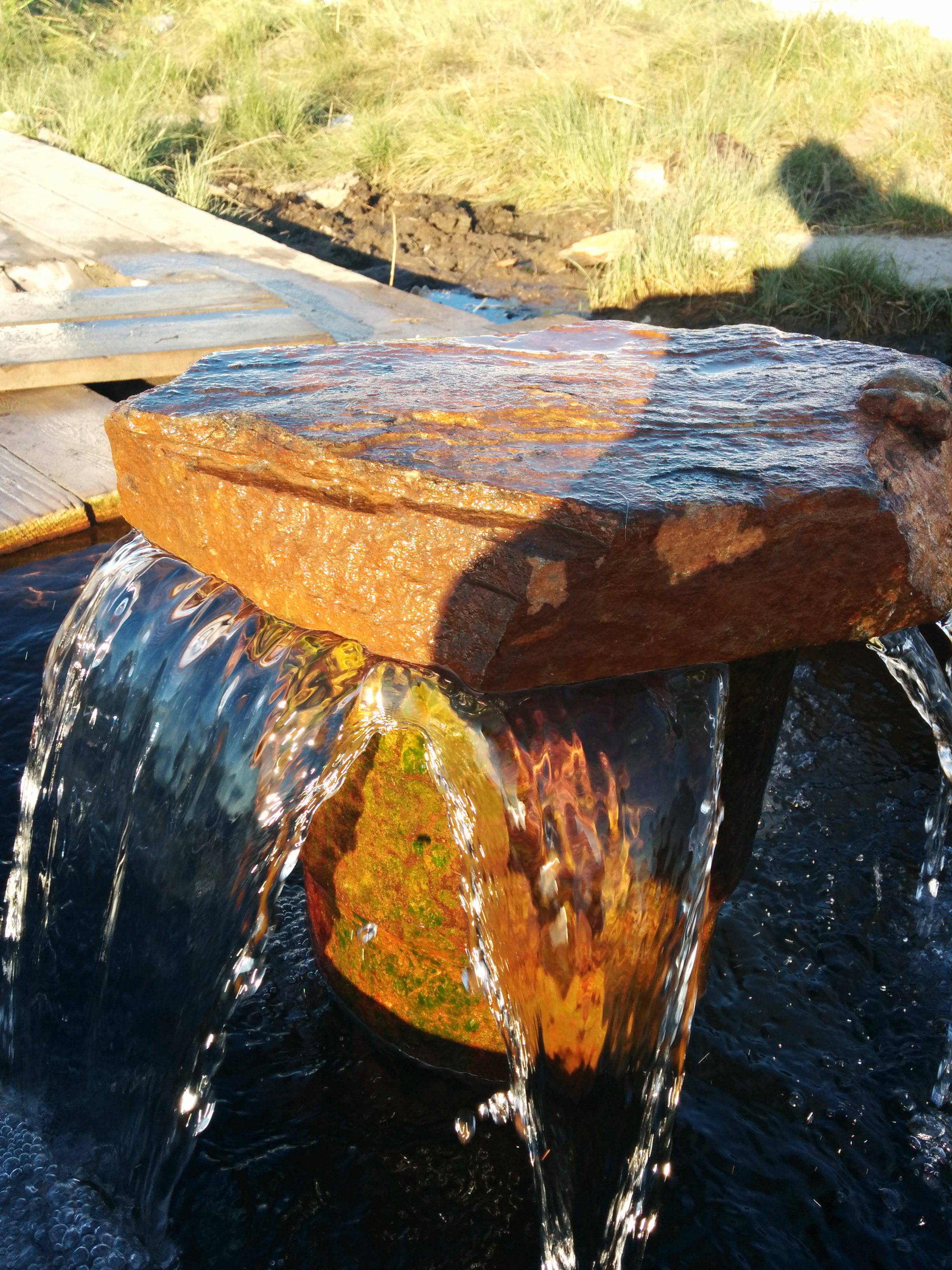 Тыва дыл: Тос-Булактың аржаан бажы